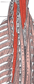 Detall del múscul semispinalis dorsi